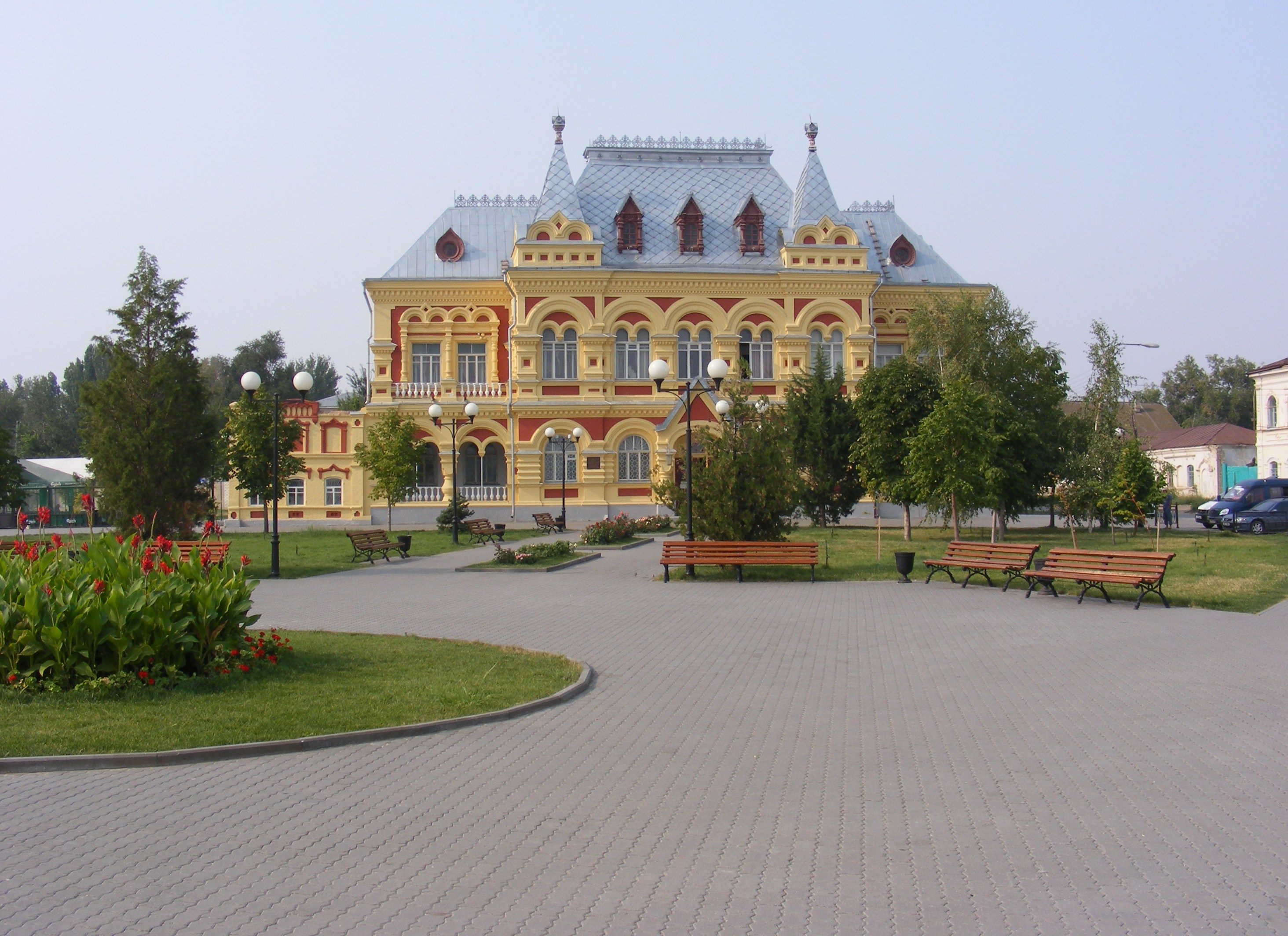 Здание историко-краеведческого музея города Камышин.